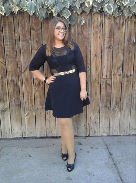 Karla Vásquez